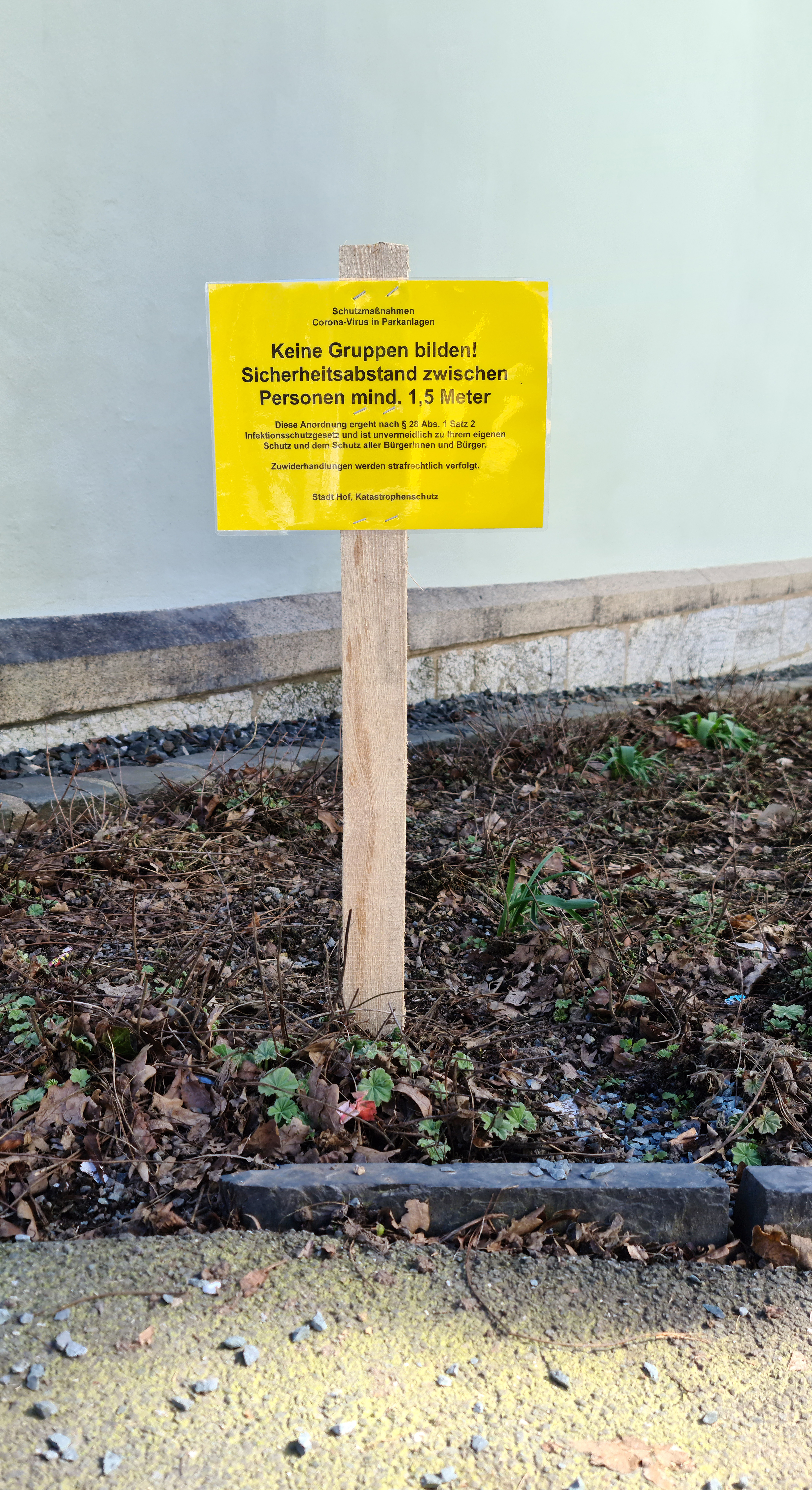 Infozeichen zu §28 IfSG in Hof an der Hospitalkirche.